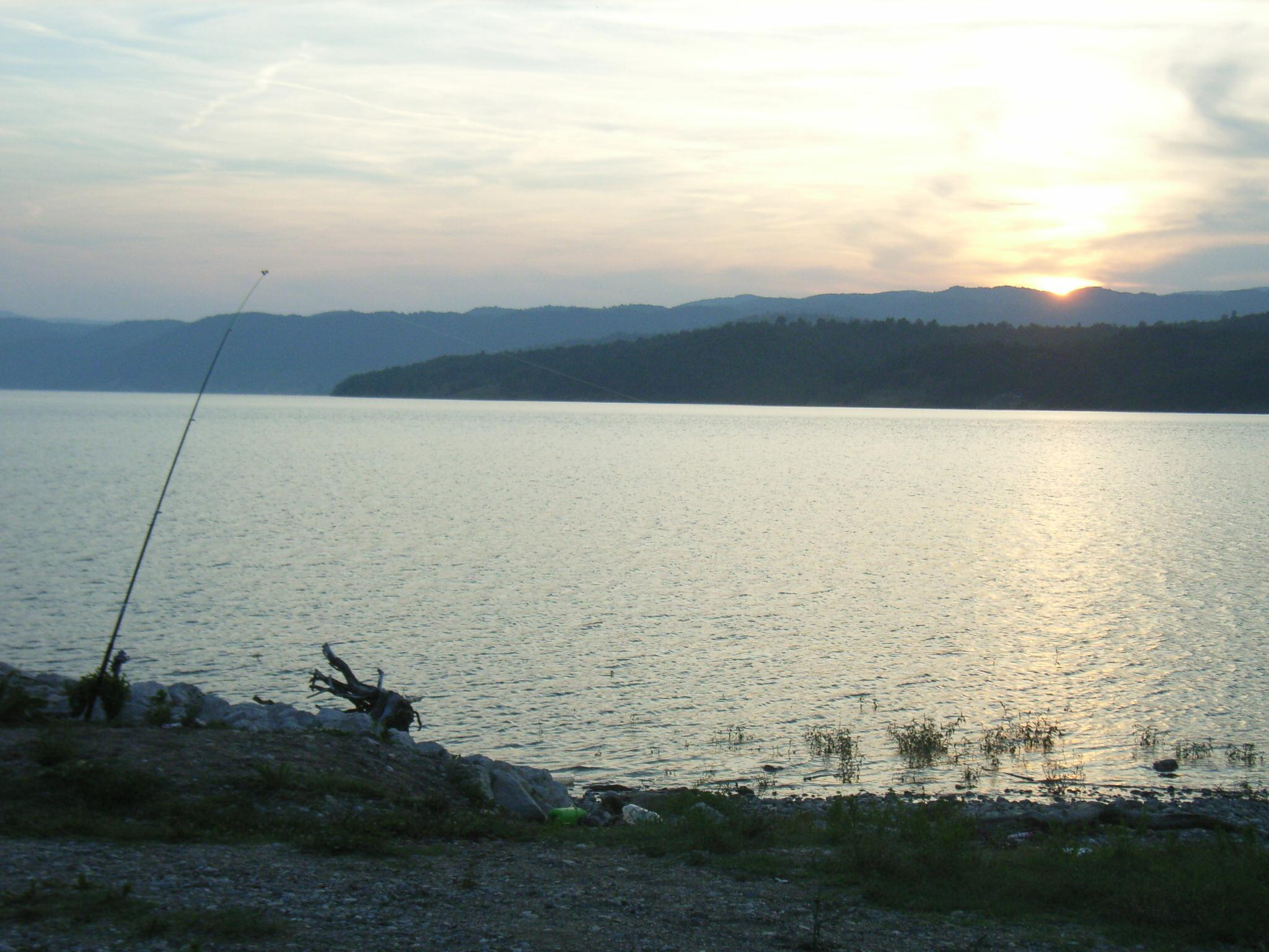 Blick über die Donau bei Tekija in Serbien auf die rumänische Seite